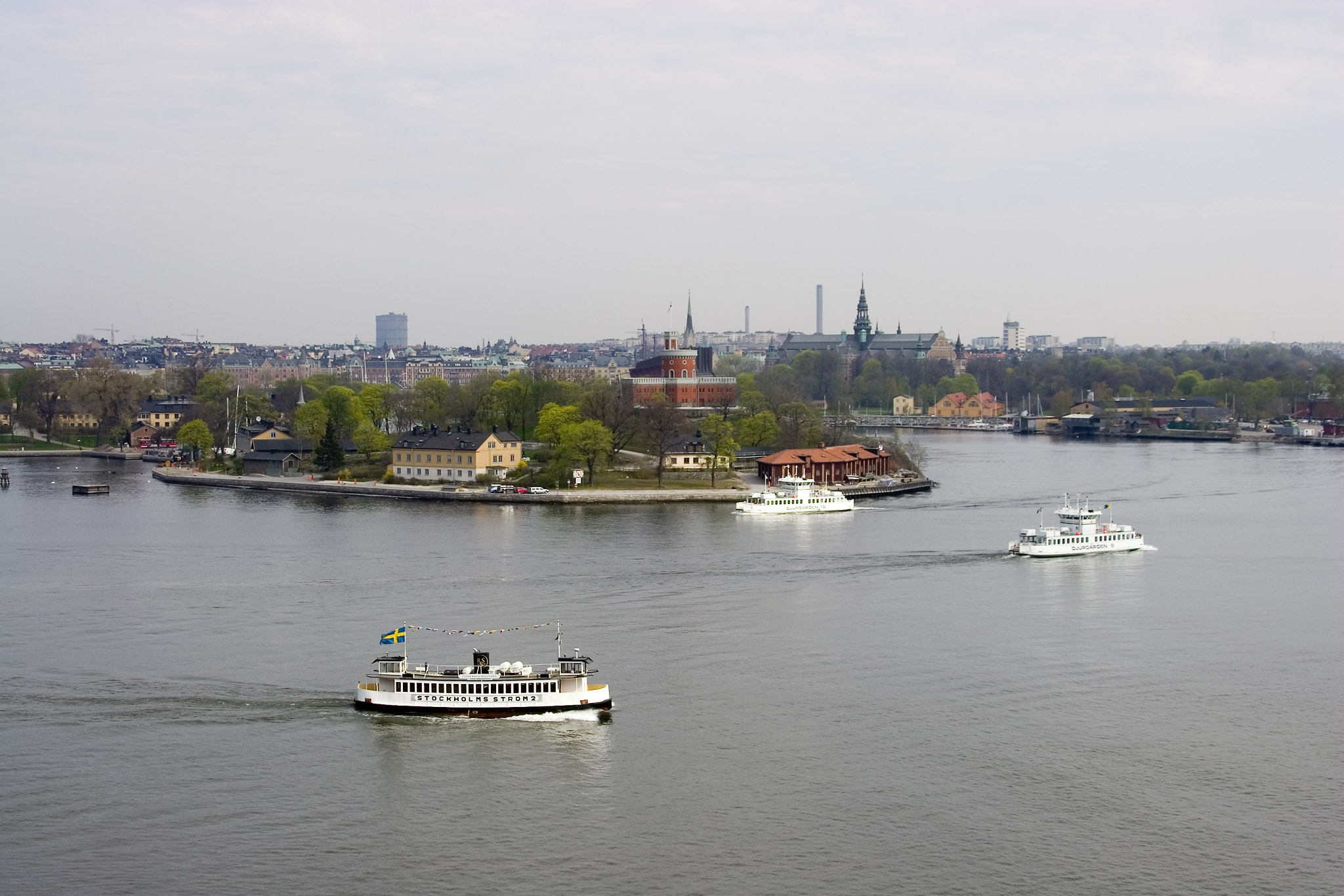 Stockholm, Sweden